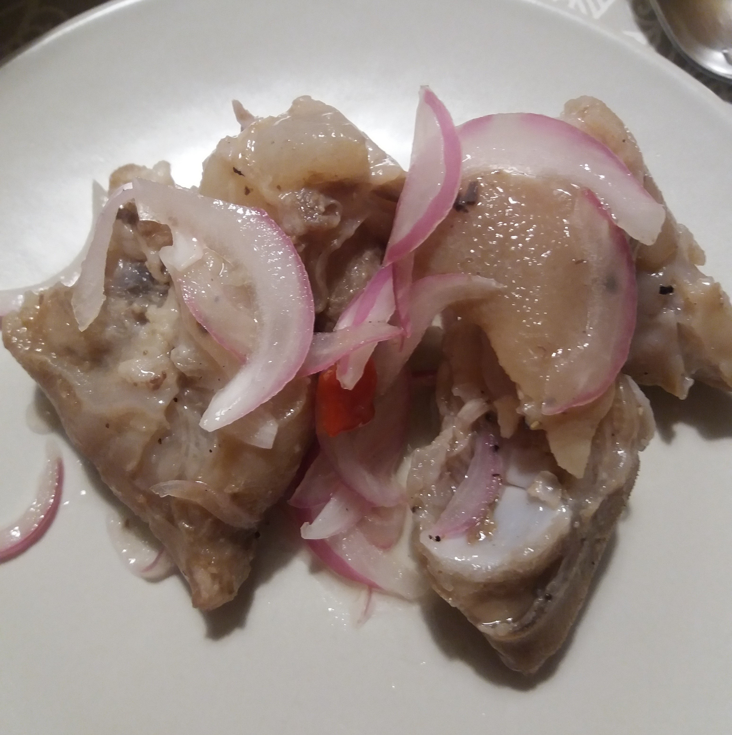 Patas de chancho con sarsa criolla